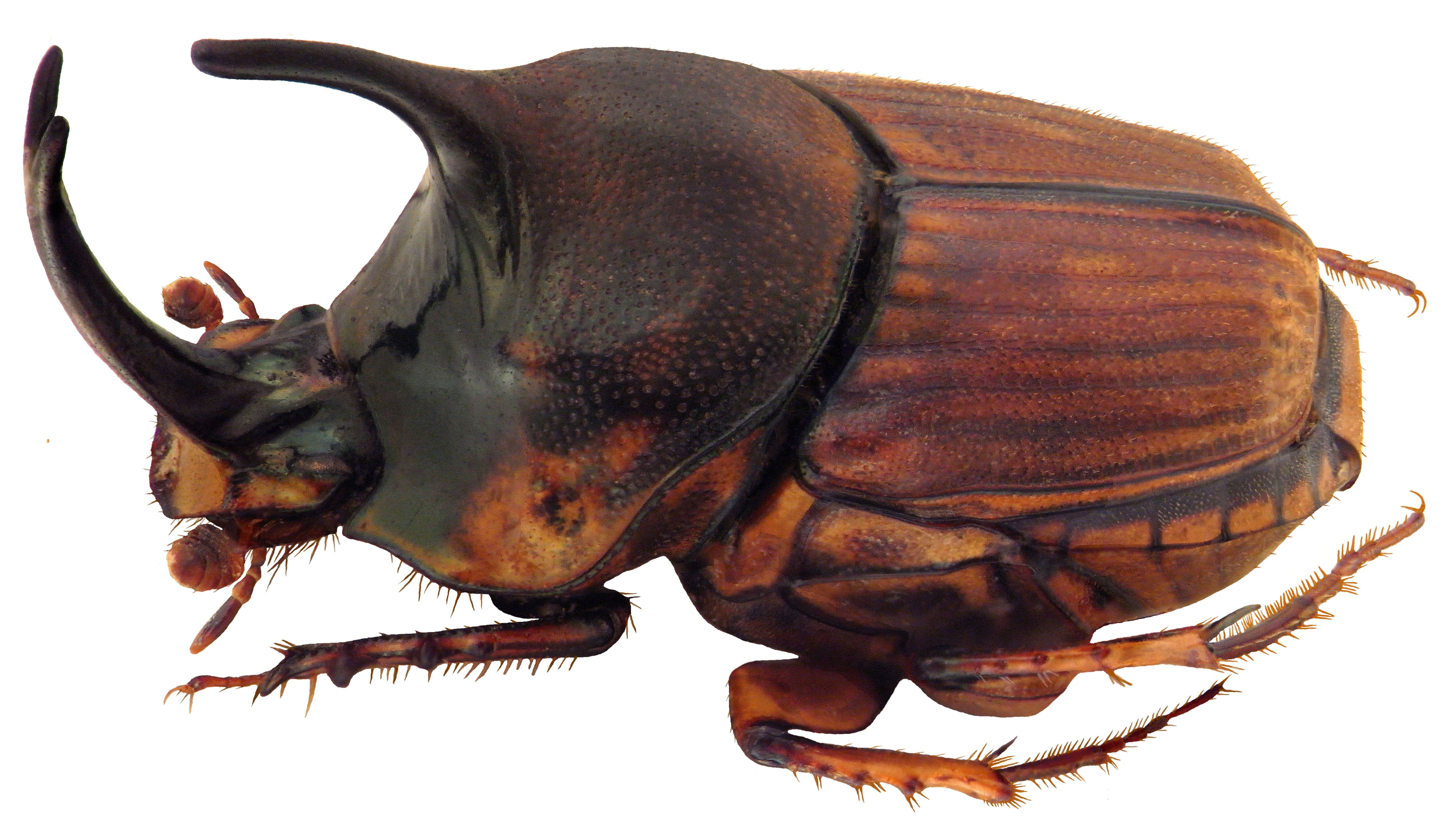 Familie: Cerambycidae Groesse: 8,3 mm Fundort: Thailand, Chom Thong leg. A.Farkac, 1991; det. J.Scheuern, 1993 Photo: U.Schmidt, 2010